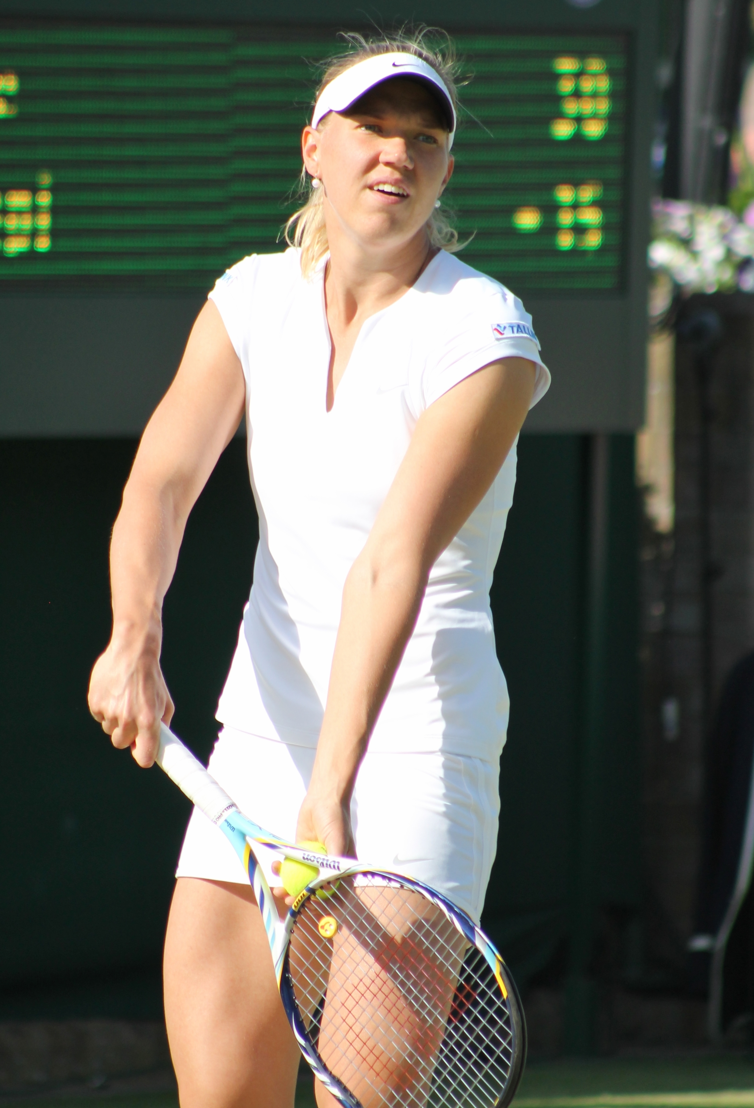 Kanepi WM13-005